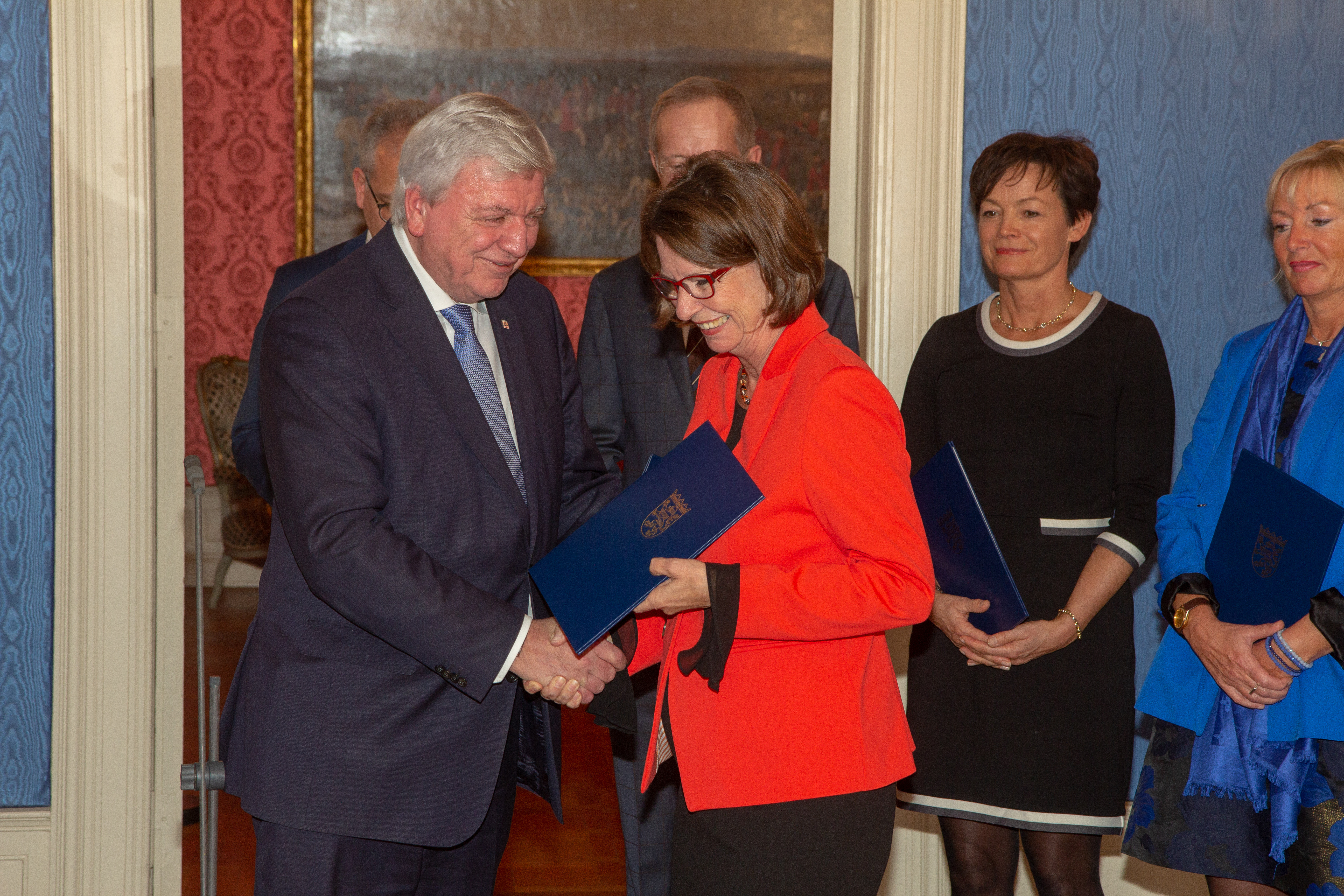 Konstituierende Sitzung des Hessischen Landtages am 18. Januar 2019 in Wiesbaden.